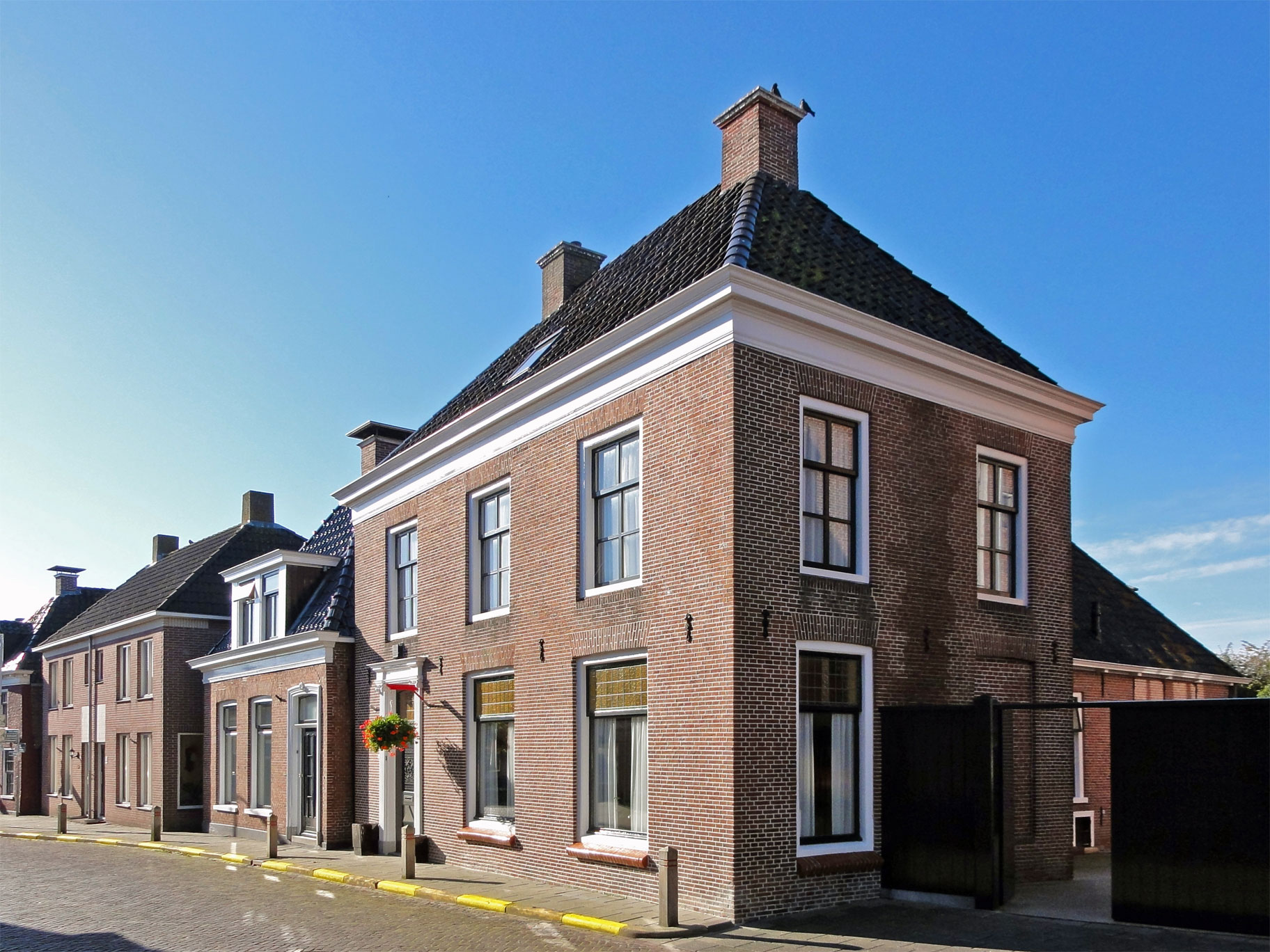 Foarstrjitte 9 in Holwerd, rijksmonument